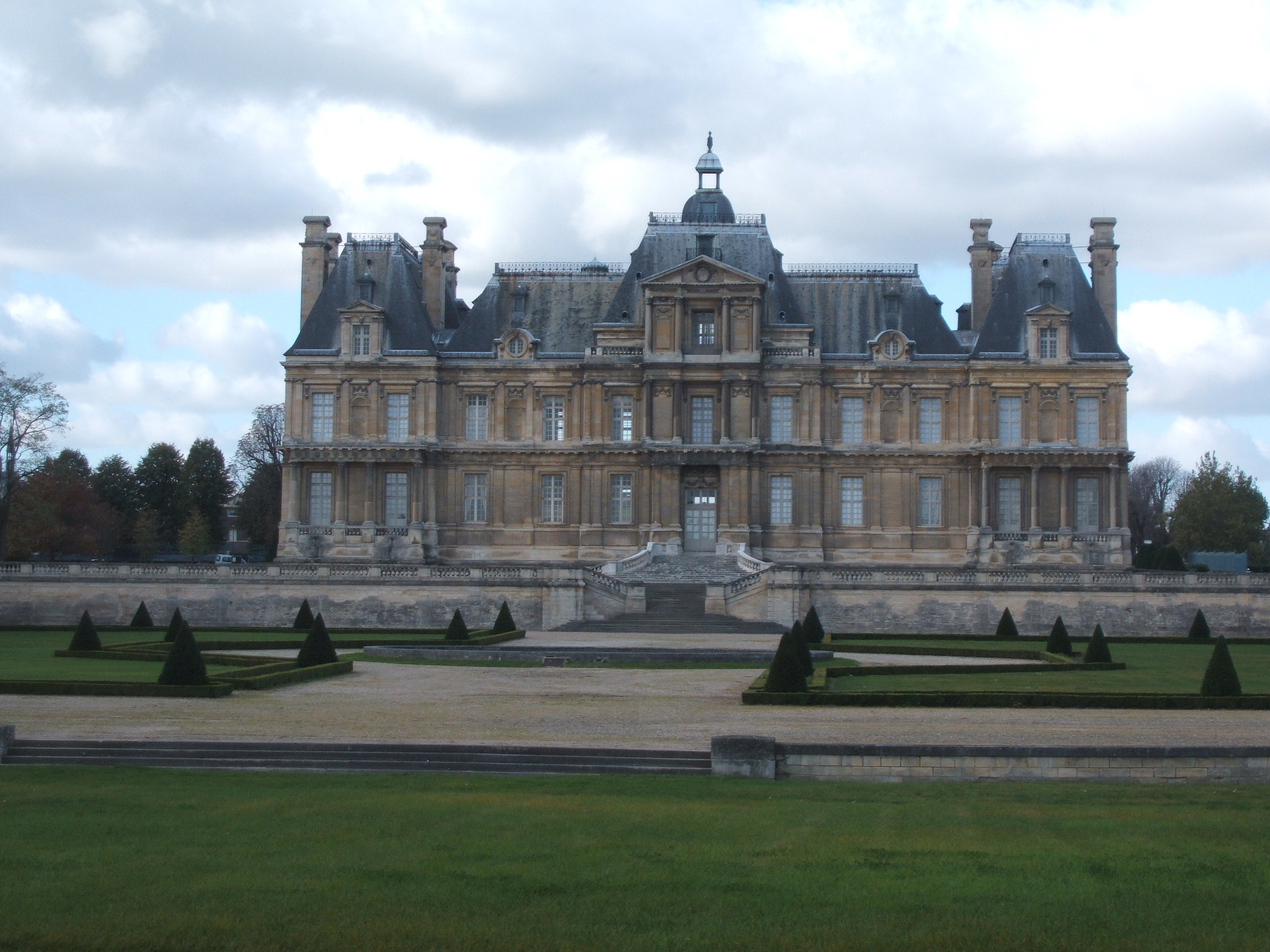 Chateau de Maisons-Laffitte